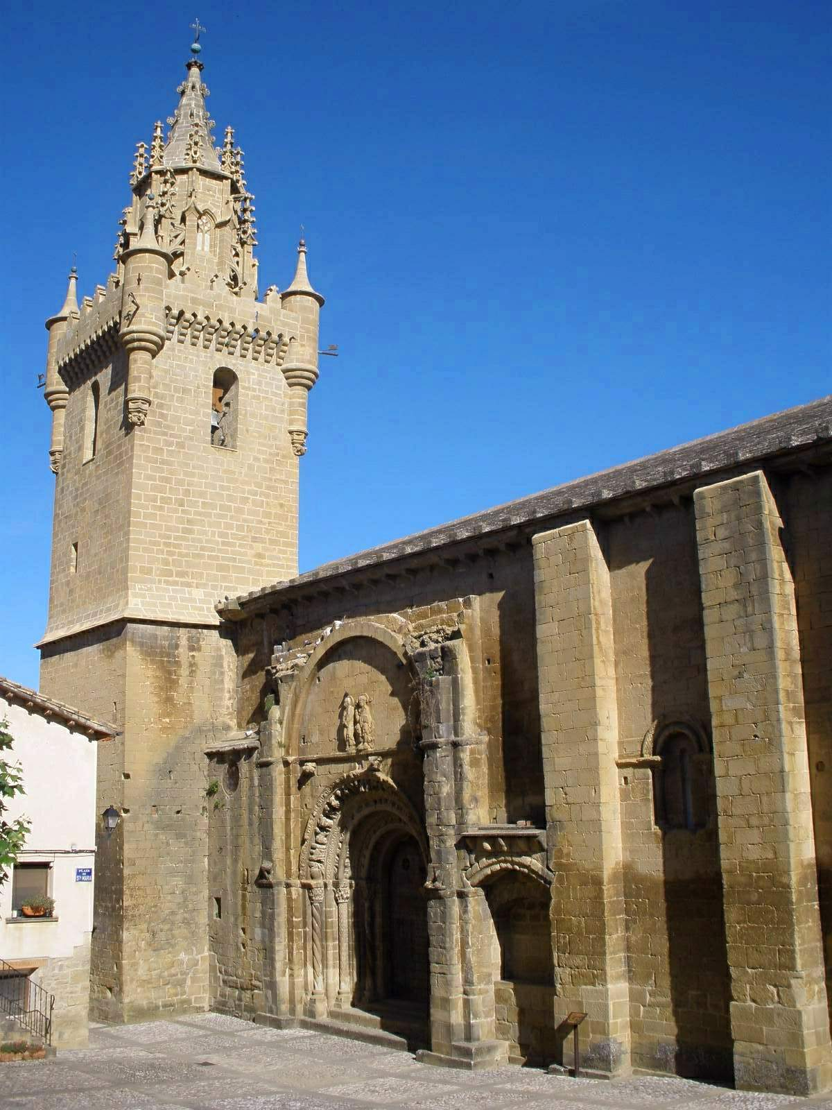 Iglesia de Santa María la Mayor, Uncastillo (Zaragoza)